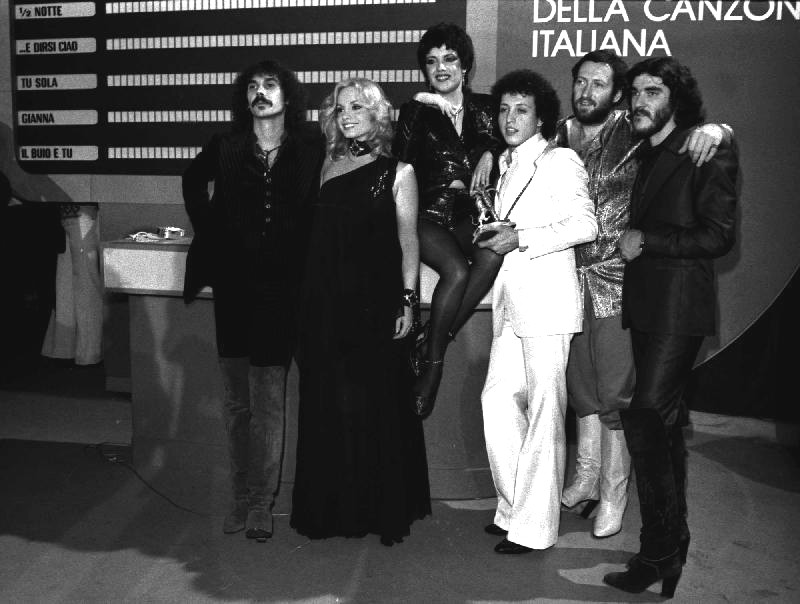 I vincitori del Festival di Sanremo 1978, i Matia Bazar, con la conduttrice Maria Giovanna Elmi